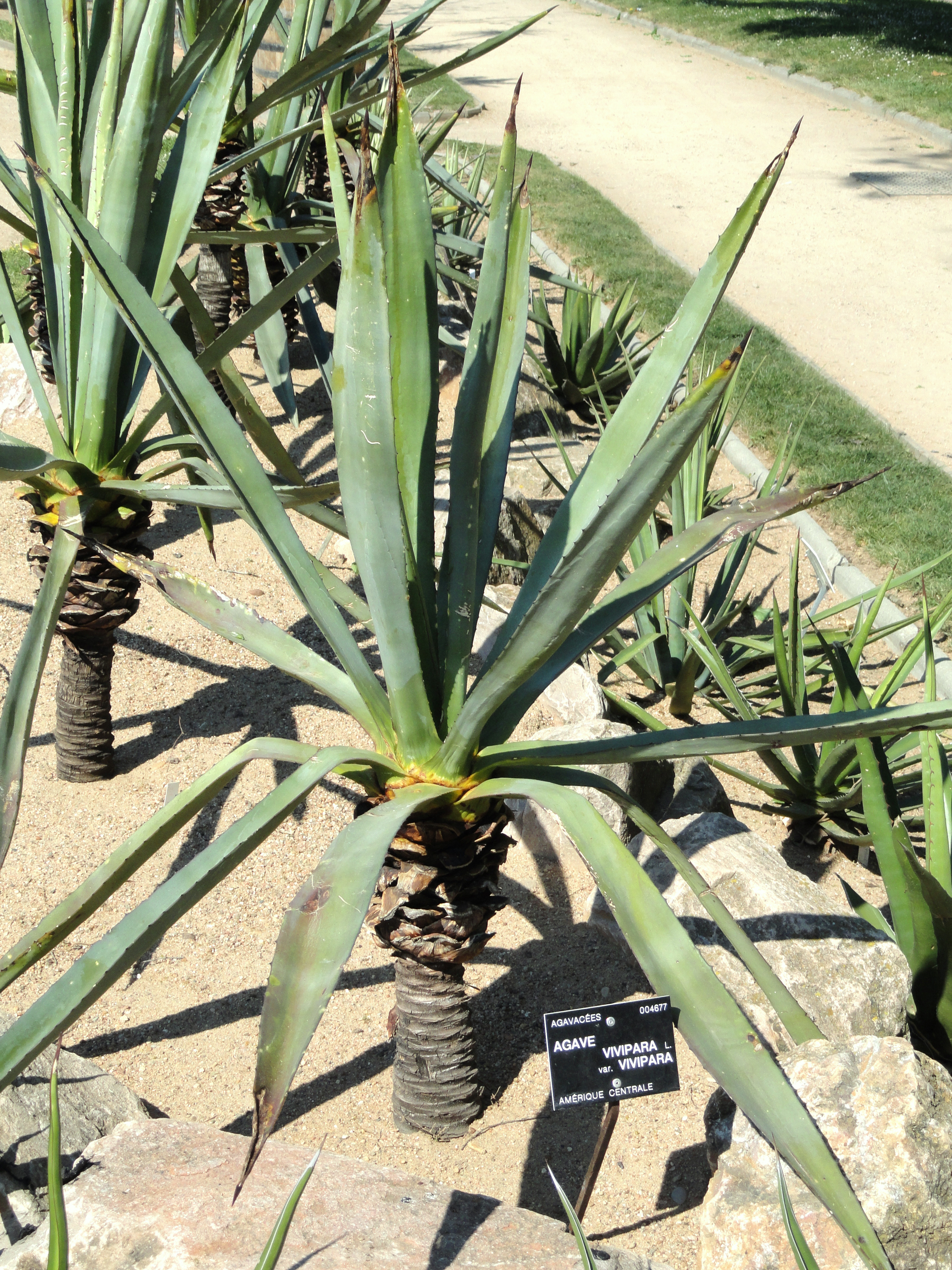 Agave vivipara specimen in the Jardin Botanique de Lyon, Parc de la Tête d'Or, Lyon, France.